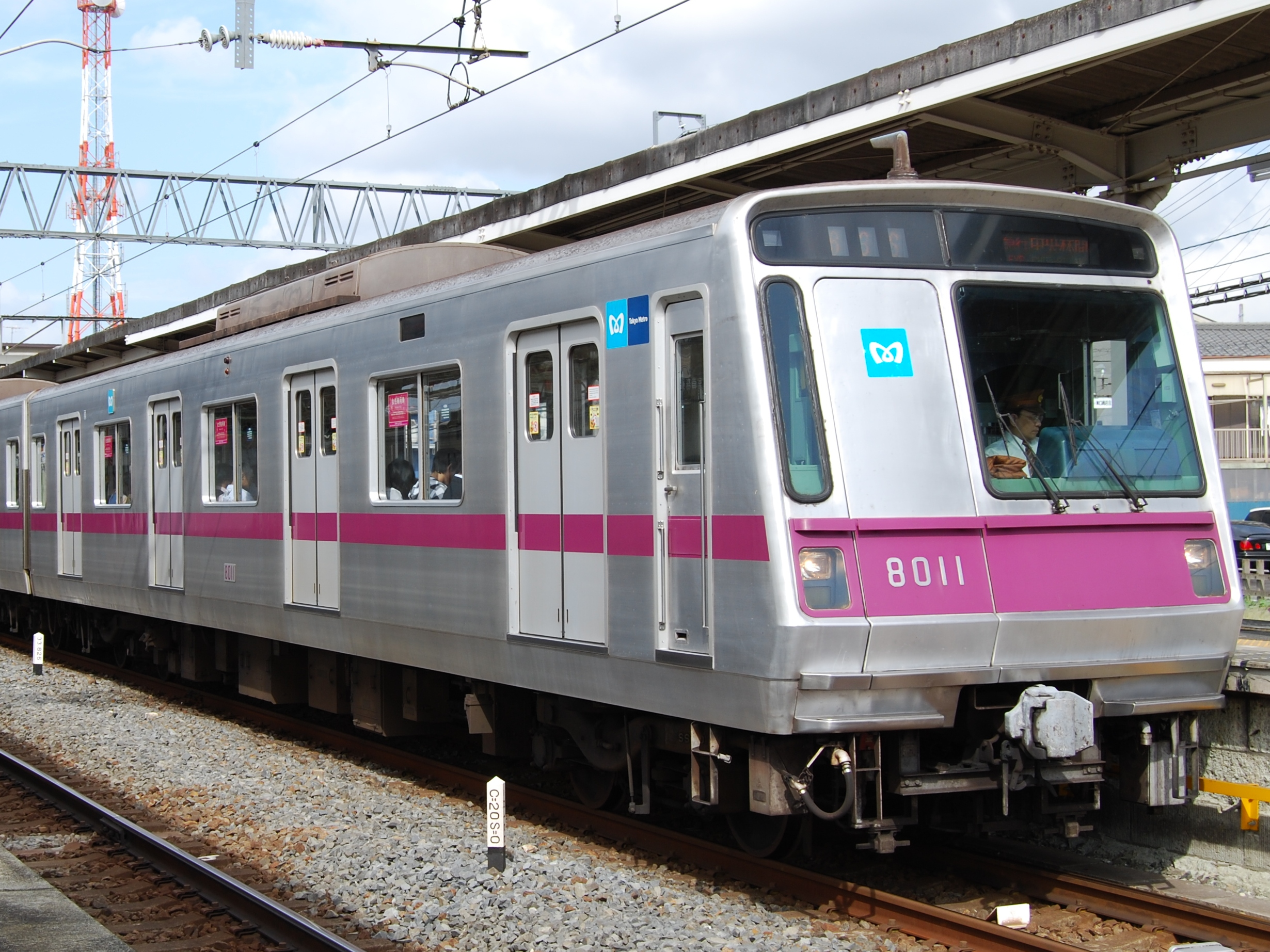 帝都高速度交通営団（現 東京メトロ）8000系電車8000形8011号（2008/10/9・東武動物公園にて撮影）